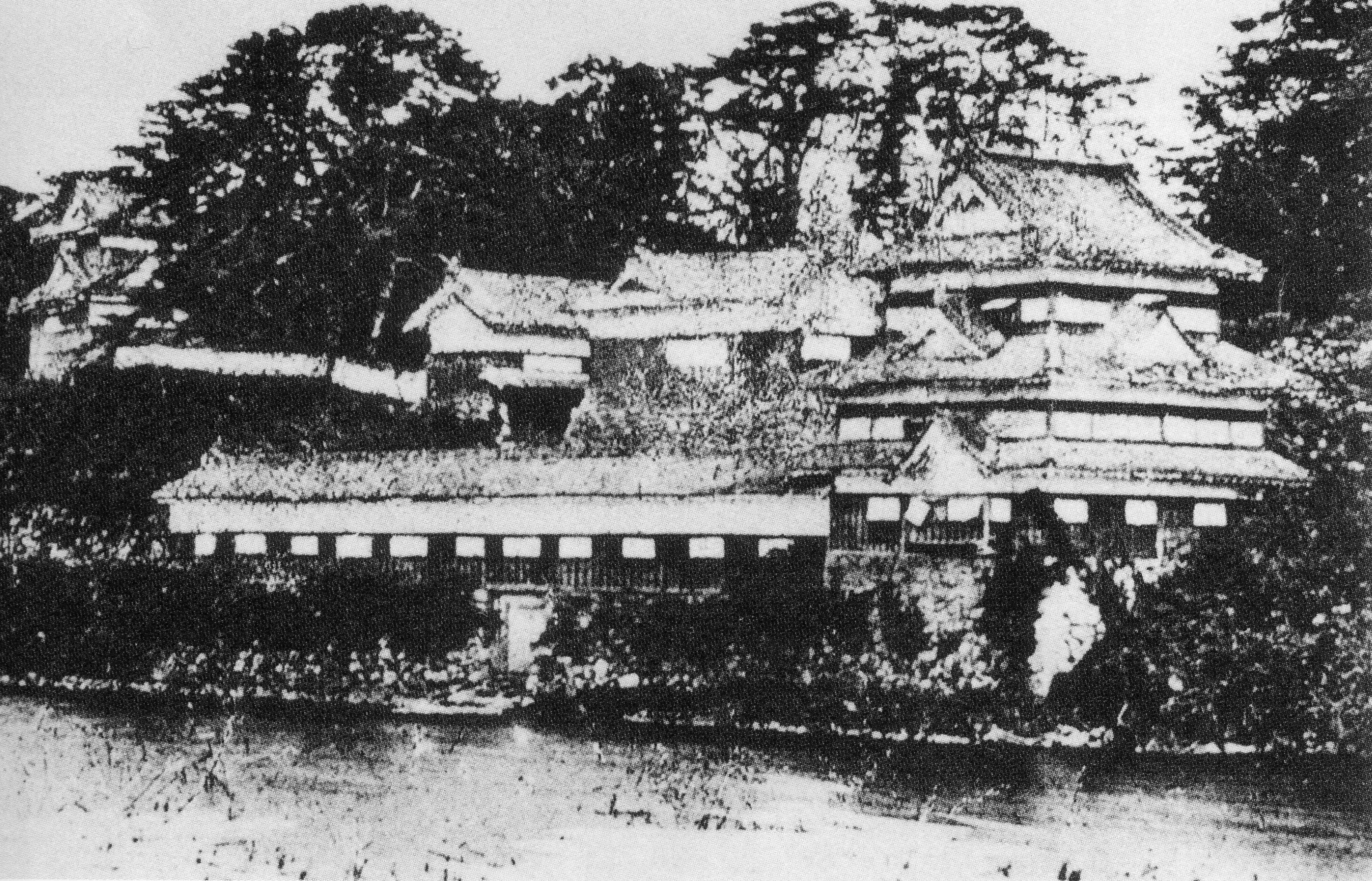 吉田城古写真